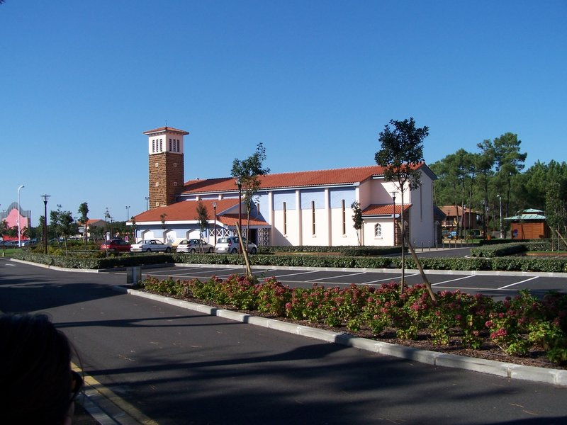 Eglise de Biscarose Plage